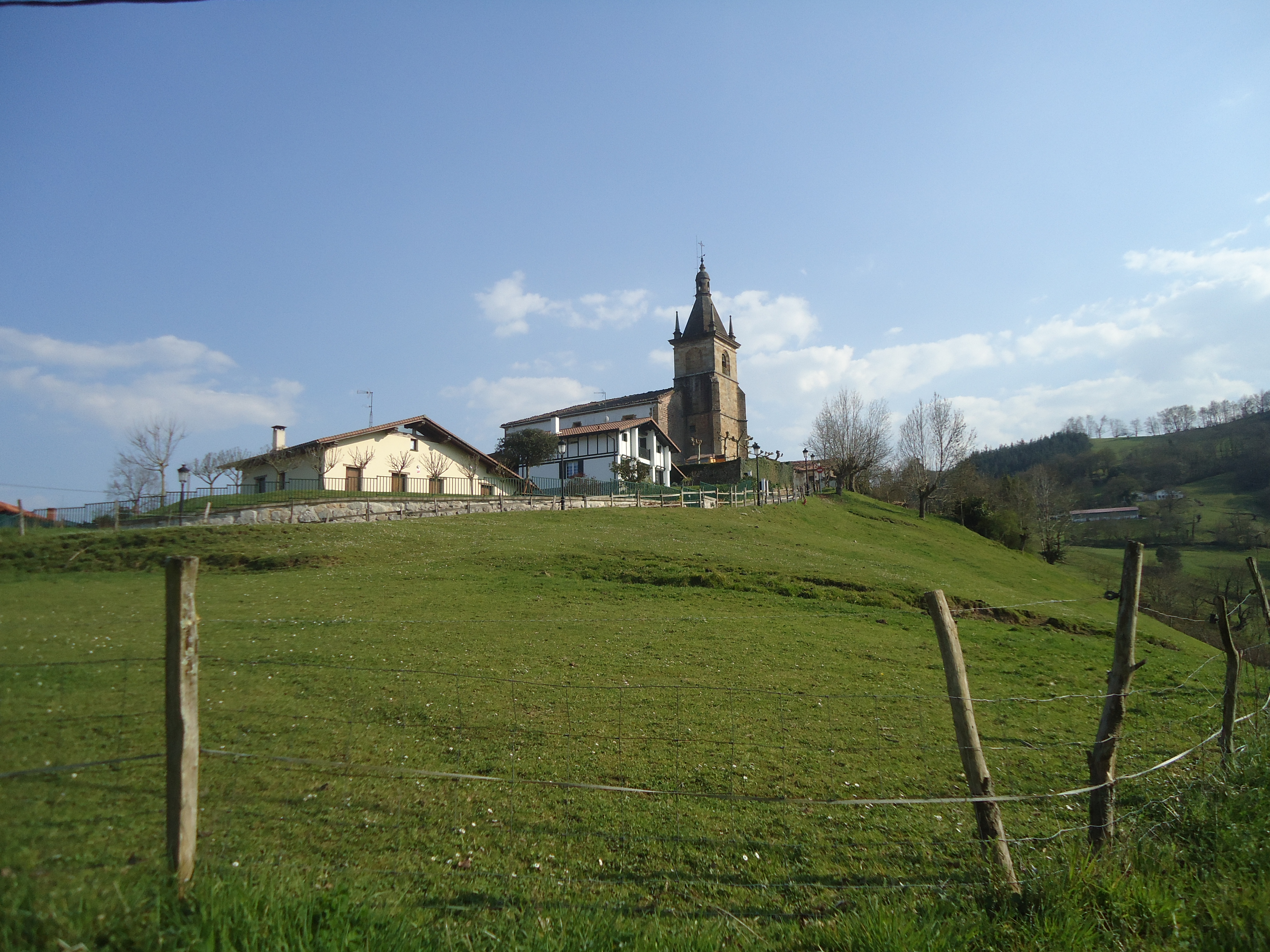 Zeraingo eliza